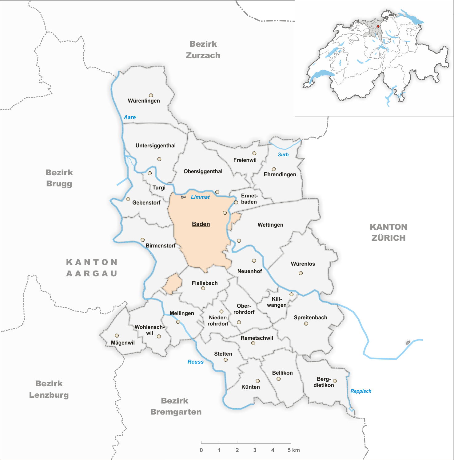 Municipality Baden